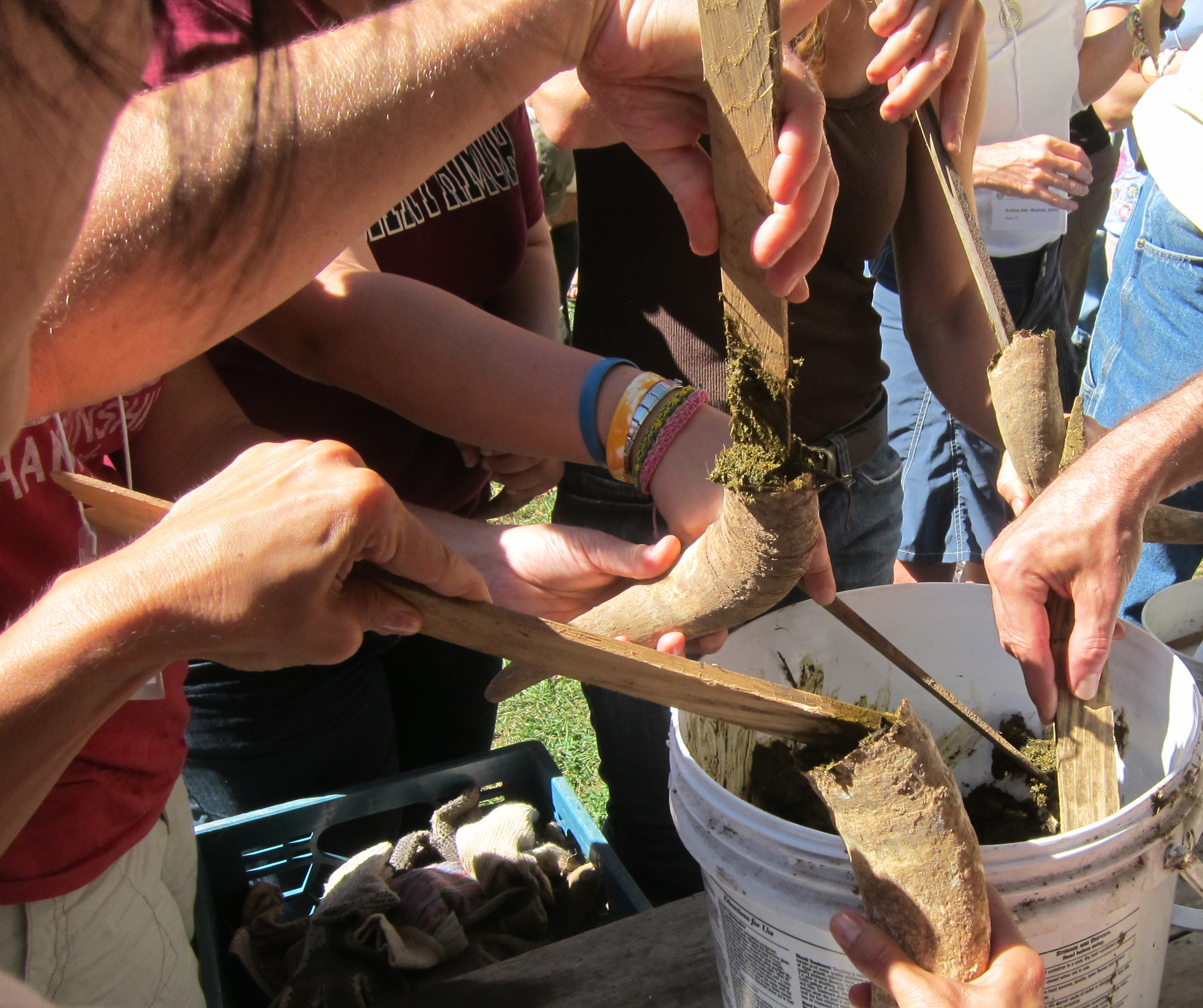 Pratique biodynamique consistant à remplissage des cornes de vache pour la confection de la préparation 500 ou "bouse de corne"